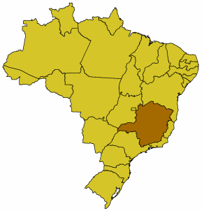 Karte Brasiliens, Minas Gerais hervorgehoben, GFDL nach der Vorlage Bild:Brasilien Bundesstaaten.png